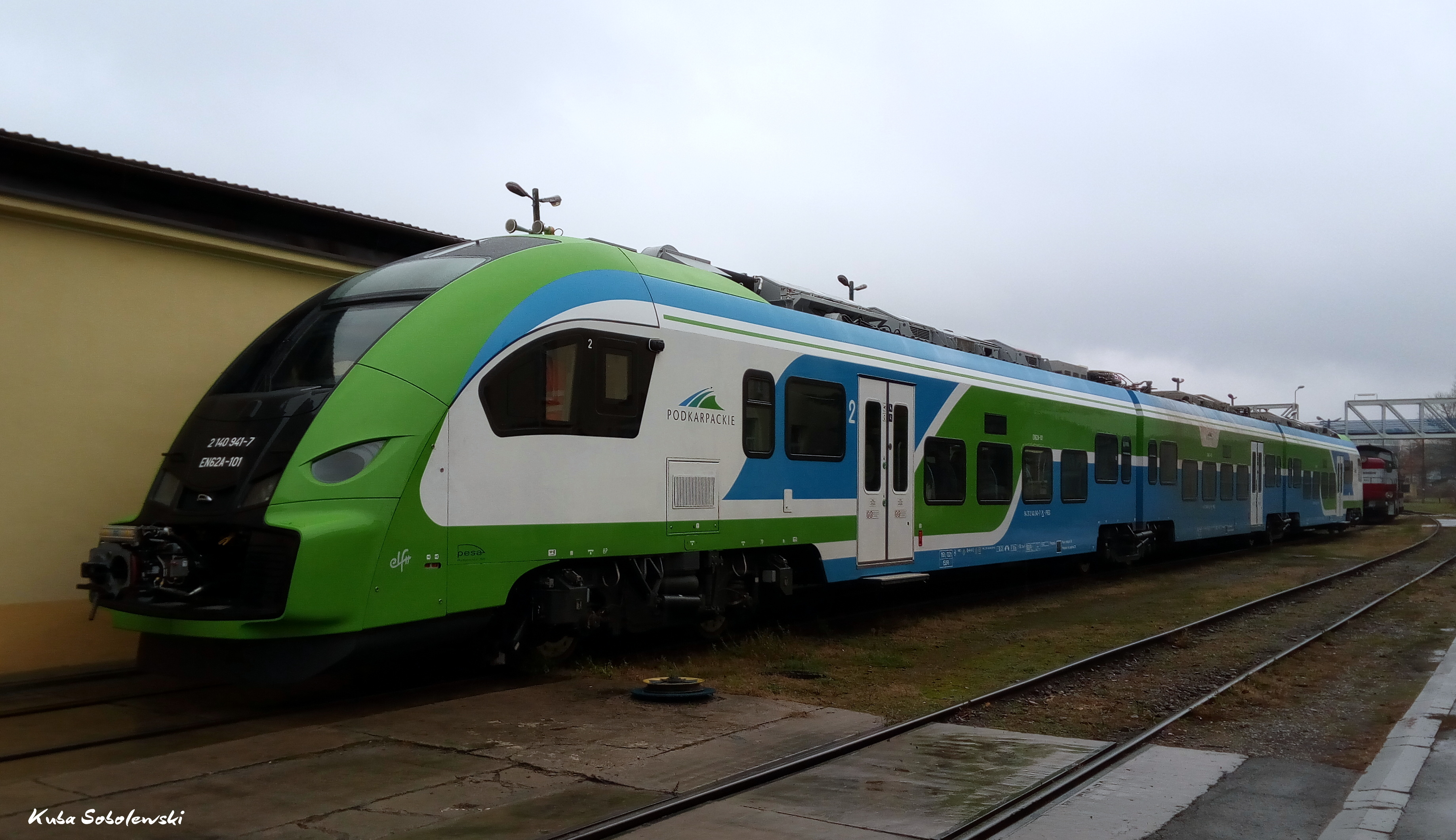 Elektryczny zespół trakcyjny Pesa Elf II EN62A-101 stoi na terenie Podkarpackiego Oddziału Przewozów Regionalnych w Rzeszowie.